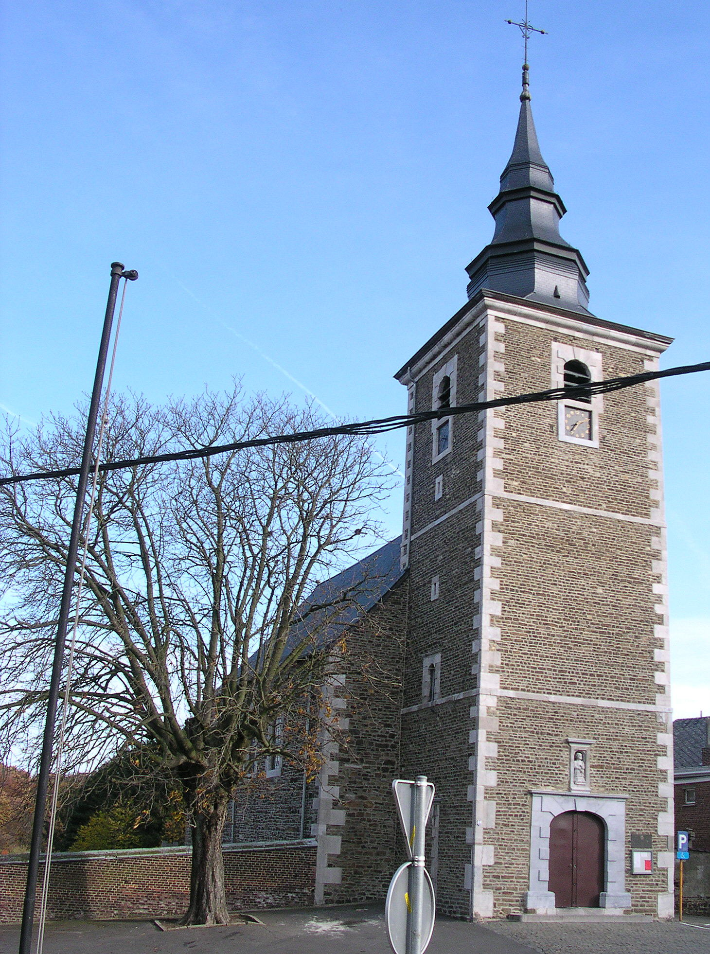 Kirche St. Pierre in Saive (gehört zu Blegny bei Lüttich)